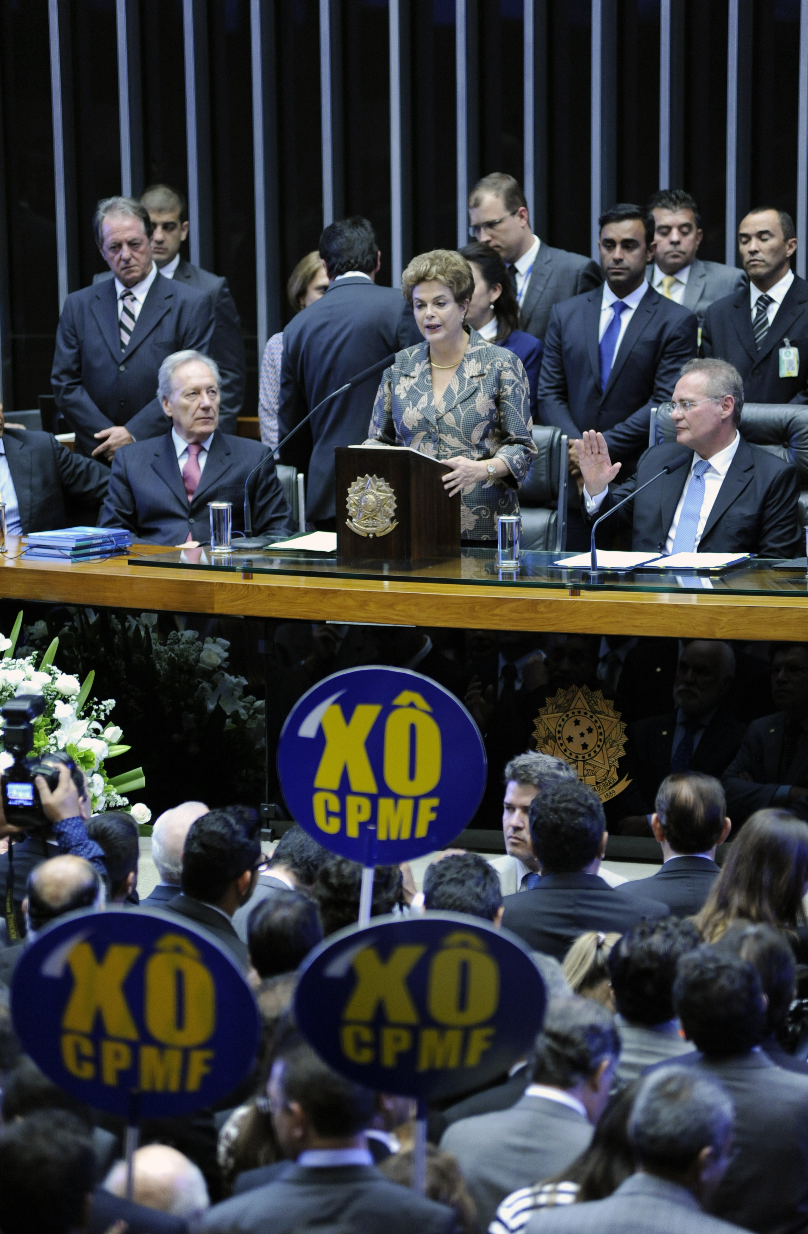 A presidente Dilma Rousseff lendo sua mensagem no Congresso Nacional enquanto um grupo de deputados protesta contra o projeto do retorno da CPMF.